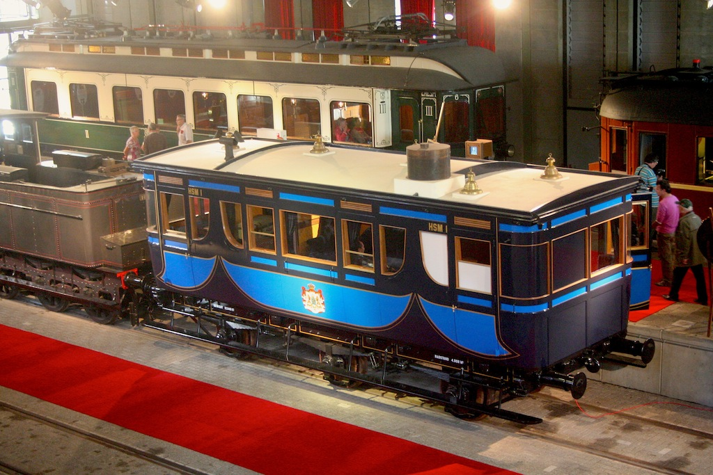 Nederlands Spoorwegmuseum rijtuig HSM 1. Foto: Erik Swierstra.